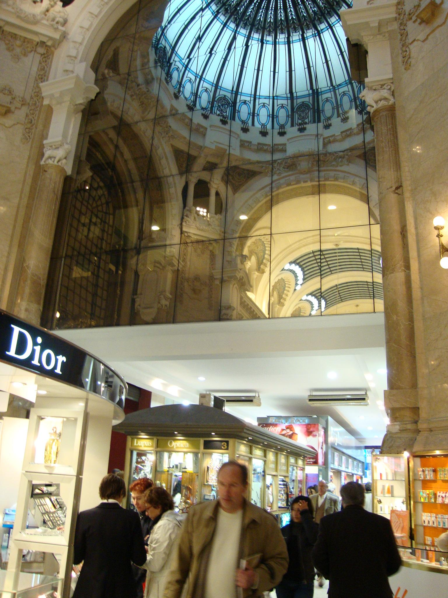 Interior de la Galería General Güemes, en el centro de la Ciudad de Buenos Aires (Argentina). Une las calles Florida y San Martín, y fue inaugurada en 1915.